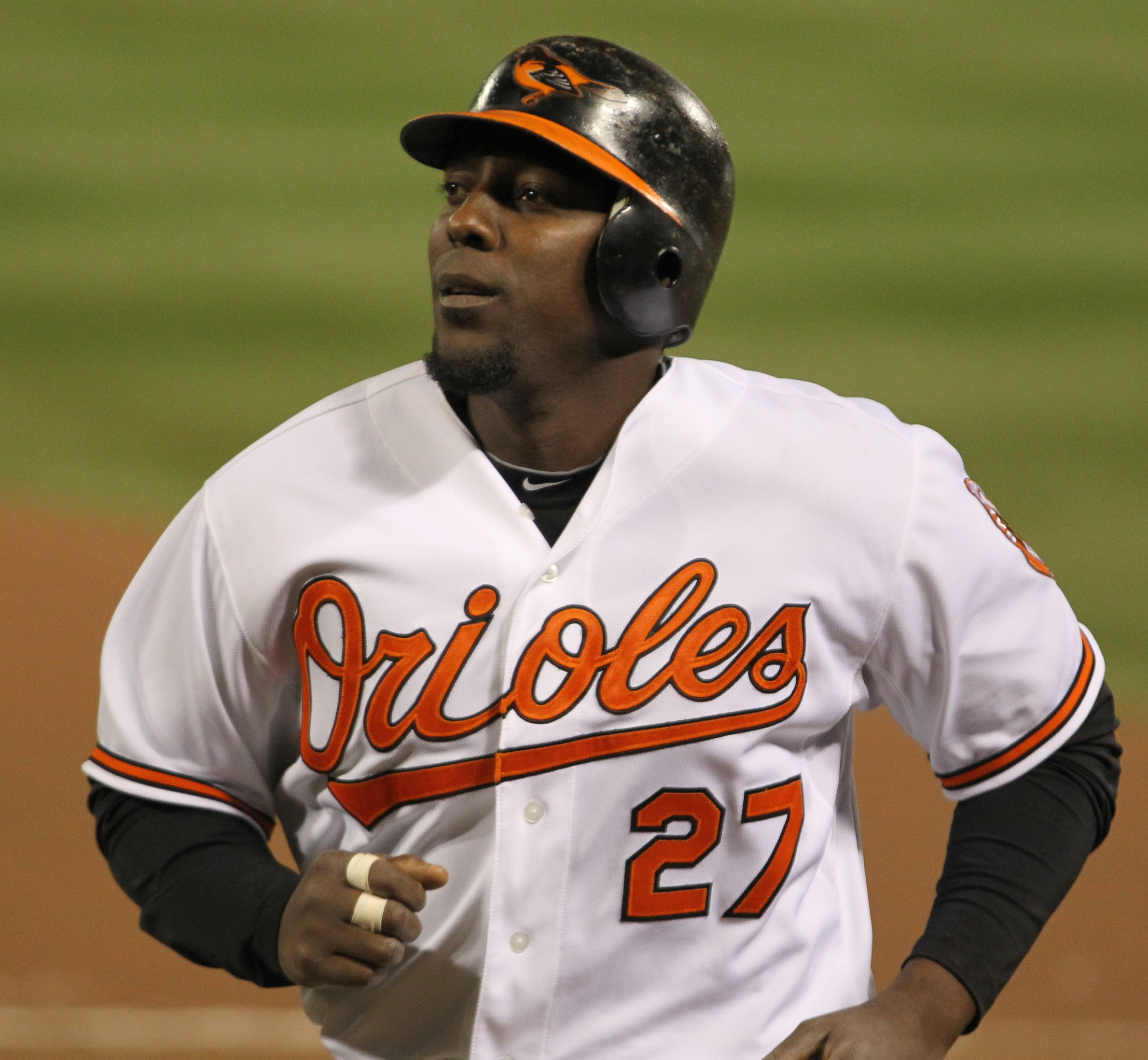 Vladimir Guerrero